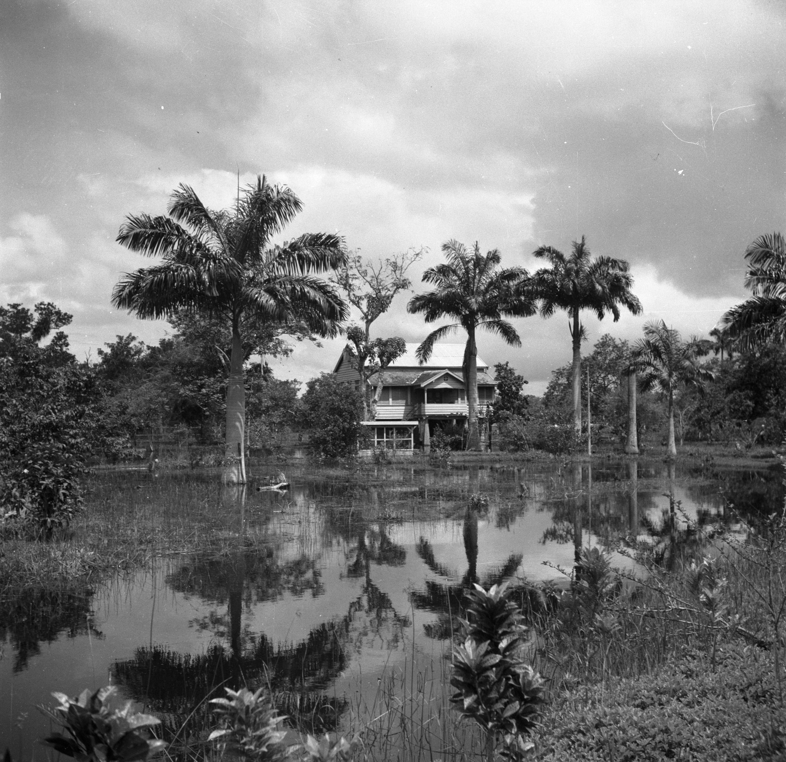 Collectie / Archief : Fotocollectie Van de Poll Reportage / Serie : Reis naar Suriname en de Nederlandse Antillen Beschrijving : Huis op de voormalige plantage Leonsberg in Suriname Datum : 1947 Locatie : Suriname Trefwoorden : plantages, woningen Fotograaf : Poll, Willem van de, [onbekend] Auteursrechthebbende : Nationaal Archief Materiaalsoort : Negatief (zwart/wit) Nummer archiefinventaris : bekijk toegang 2.24.14.02 Bestanddeelnummer : 252-6413